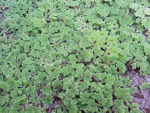 Species: Azolla caroliniana Family: Azollaceae Image No. 3